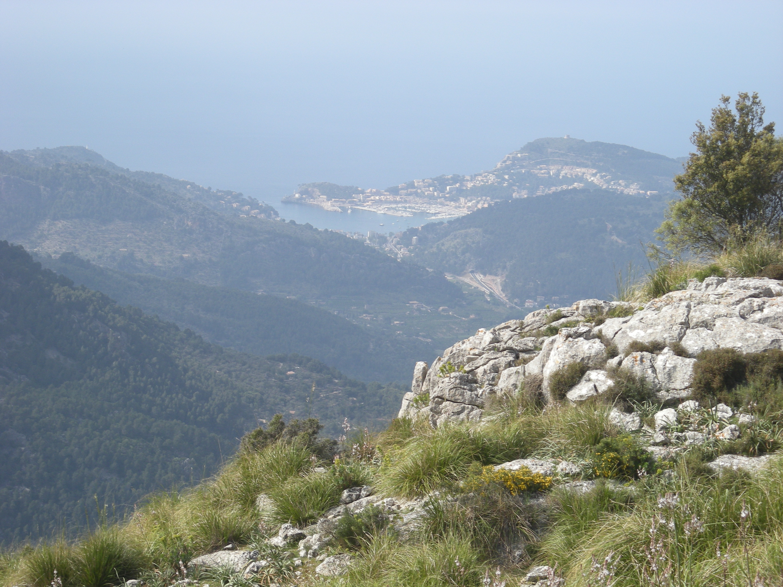 El Port de Sóller des d'Alfàbia